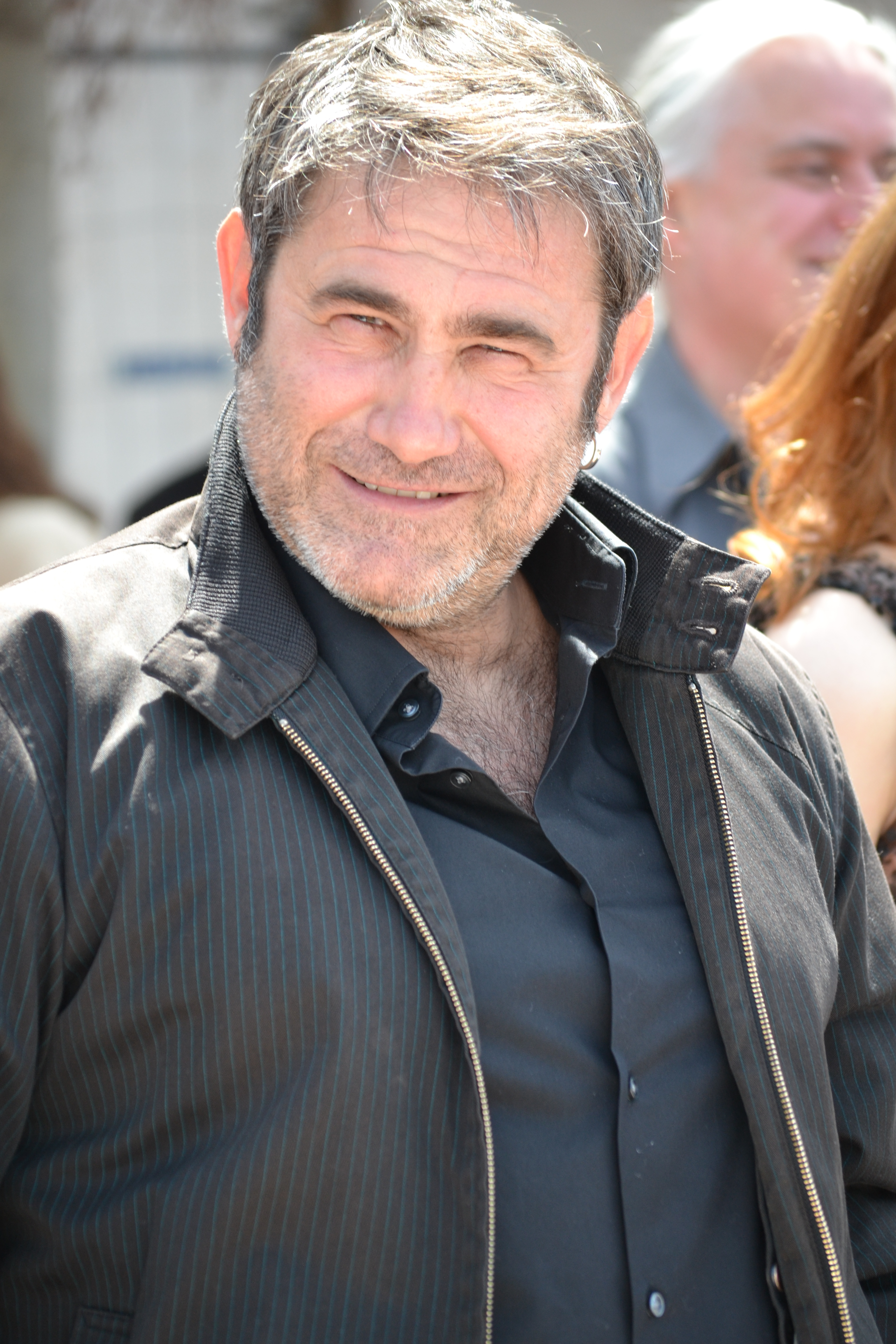 Sergi Lopez au festival de Cannes